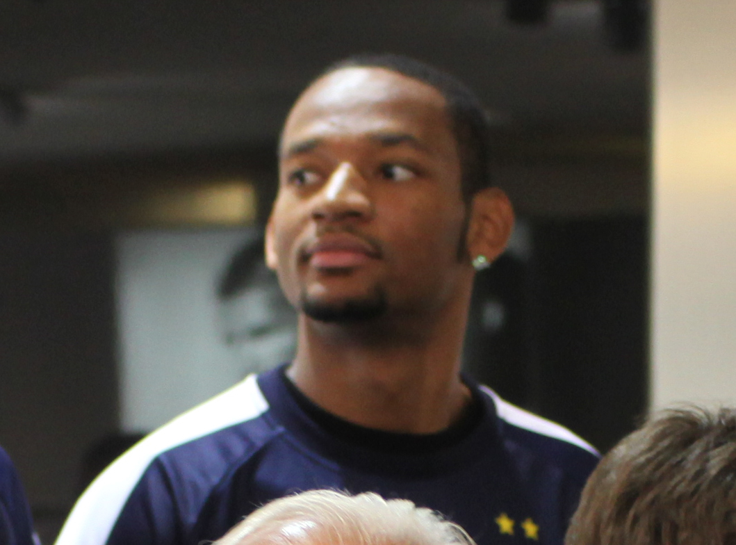 Mike Hall nel 2009 ai tempi dell'Olimpia Milano.